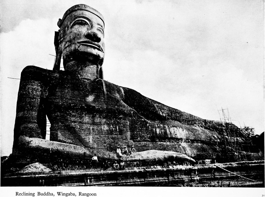 Wingaba, Rangoon